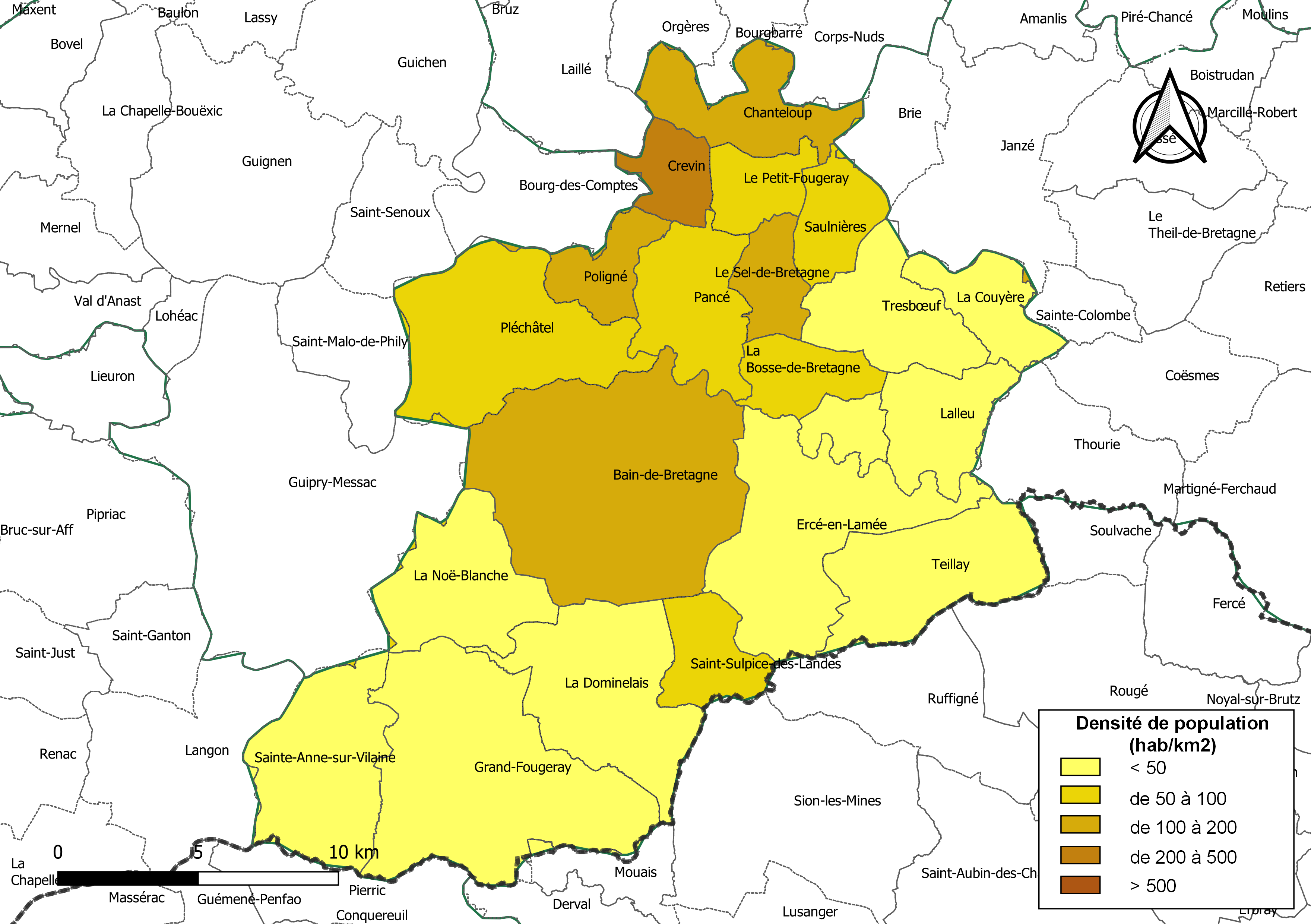 Carte des densités de population (millésimée 2016) des communes de l'intercommunalité Bretagne Porte de Loire Communauté, département d'Ille-et-Vilaine, France. Composition au 1er janvier 2019.